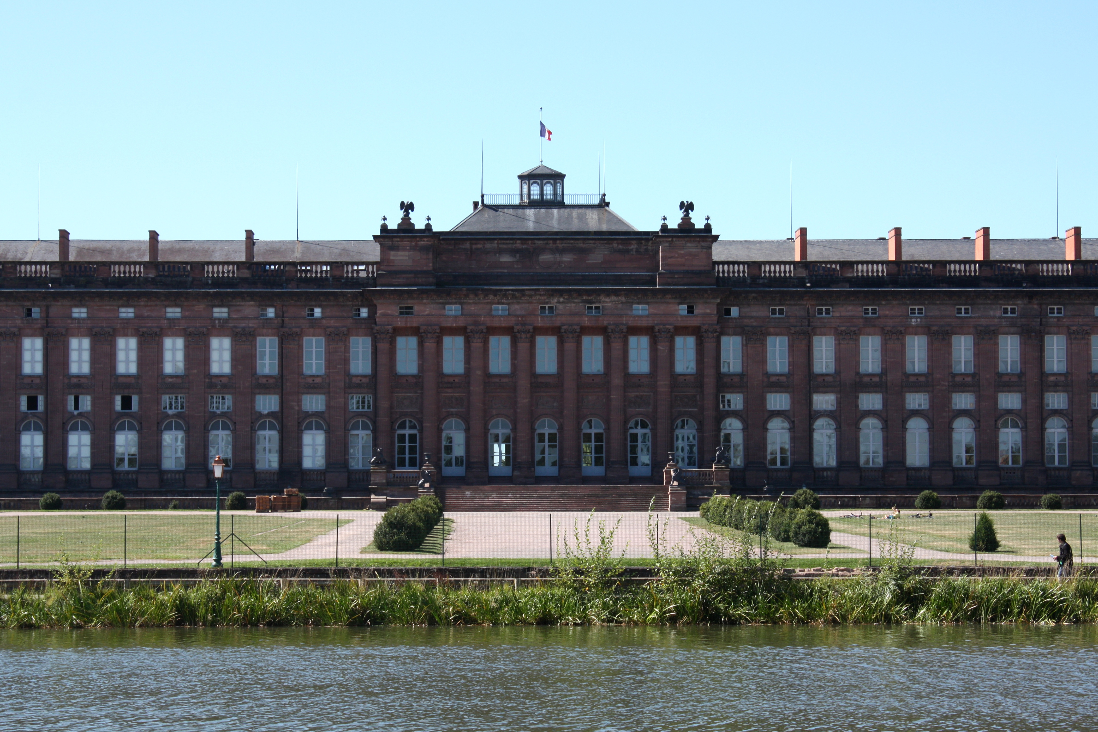 Le château des Rohan, depuis 1790, est le monument principal de Saverne, Bas-Rhin, Alsace, France. Contruit par l'architecte Nicolas Alexandre Salins de Montfort (* 1753 Versailles; † 1838 Nantes) à la demande du Cardinal Louis René de Rohan Guéméné. Façade de grès rose de 140m